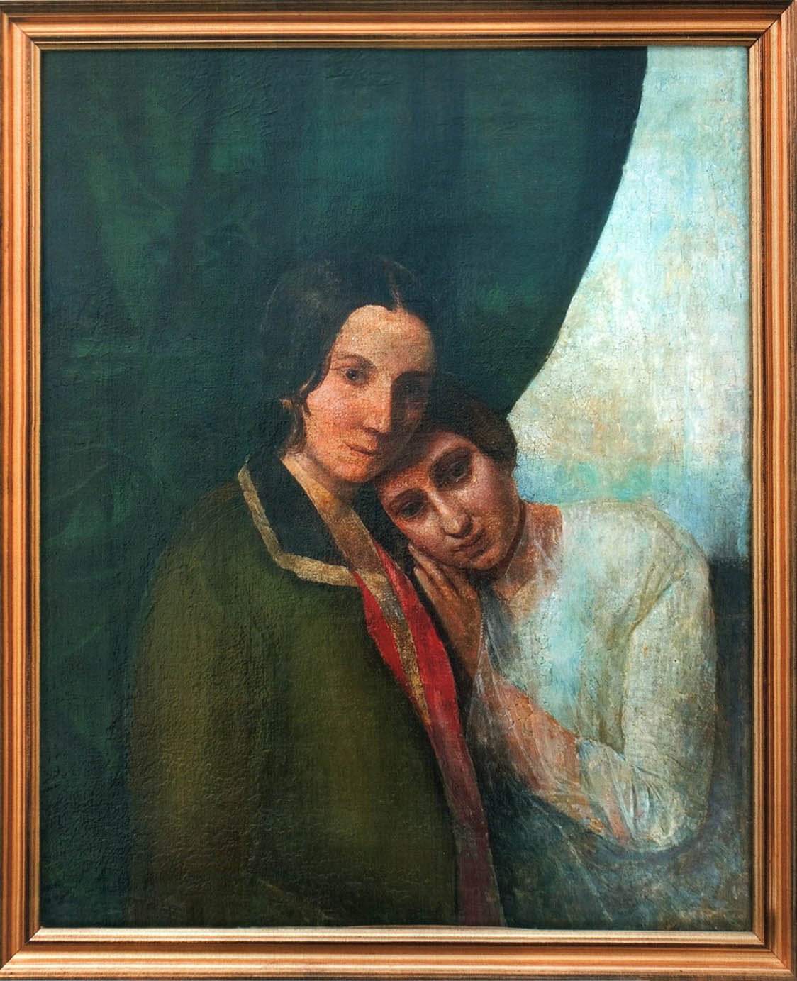 Парный портрет передал в дар Днепропетровскому музею им. Д. И. Яворницкого для Музейного центра Е. П. Блаватской и ее семьи родственник Е. П. Блаватской по отцовской линии, Петр Алексеевич Ган (1916-?), профессор, заслуженный деятель науки Киргизстана, в 1980 году награжден орденом "Дружбы народов". "На портрете девушке не менее 14 лет, а изображена она рядом с матерью, которая умерла, когда ей не исполнилось и 11". По предположениям исследователей портрет мог быть написан в 1844-1845 годах, когда Елена путешествовала со своим отцом по Европе. Автором парного портрета, как утверждают исследователи, могли быть либо отец Е. П. Блаватской, либо сама Е.П.Блаватская. По материалам статьи: Е.В. Аливанцева, директор Музейного центра Е. П. Блаватской и ее семьи. «Елена Ган и Елена Блаватская: Неизвестный парный портрет» // Журнал «Культура и время» 2 (20) - 2006, Международный Центр Рерихов